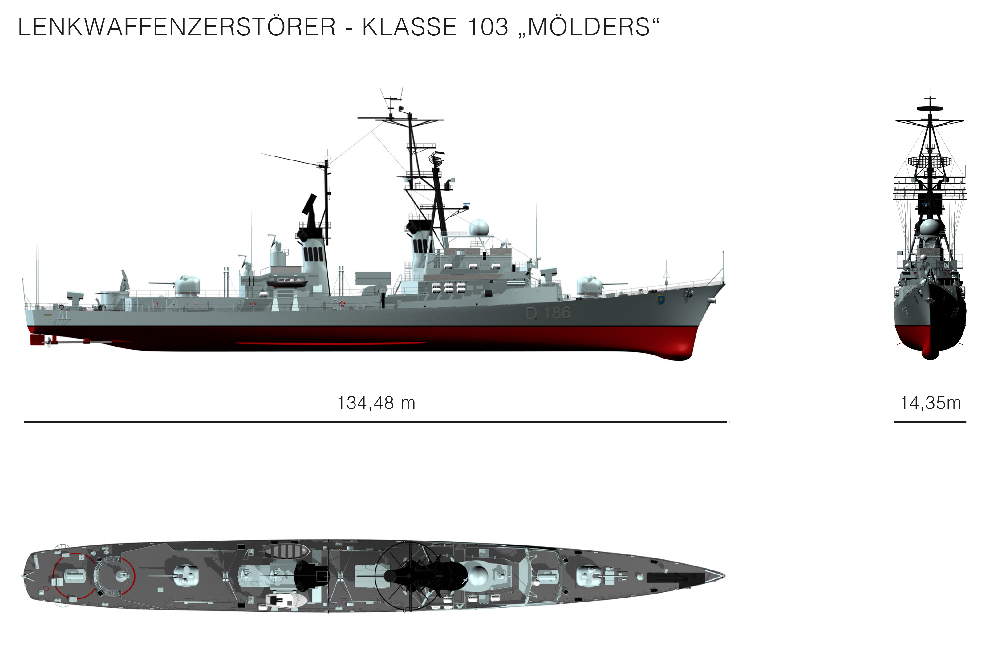 Dreiseitenansicht des Lenkwaffen Zerstörers "Mölders" der deutschen Marine